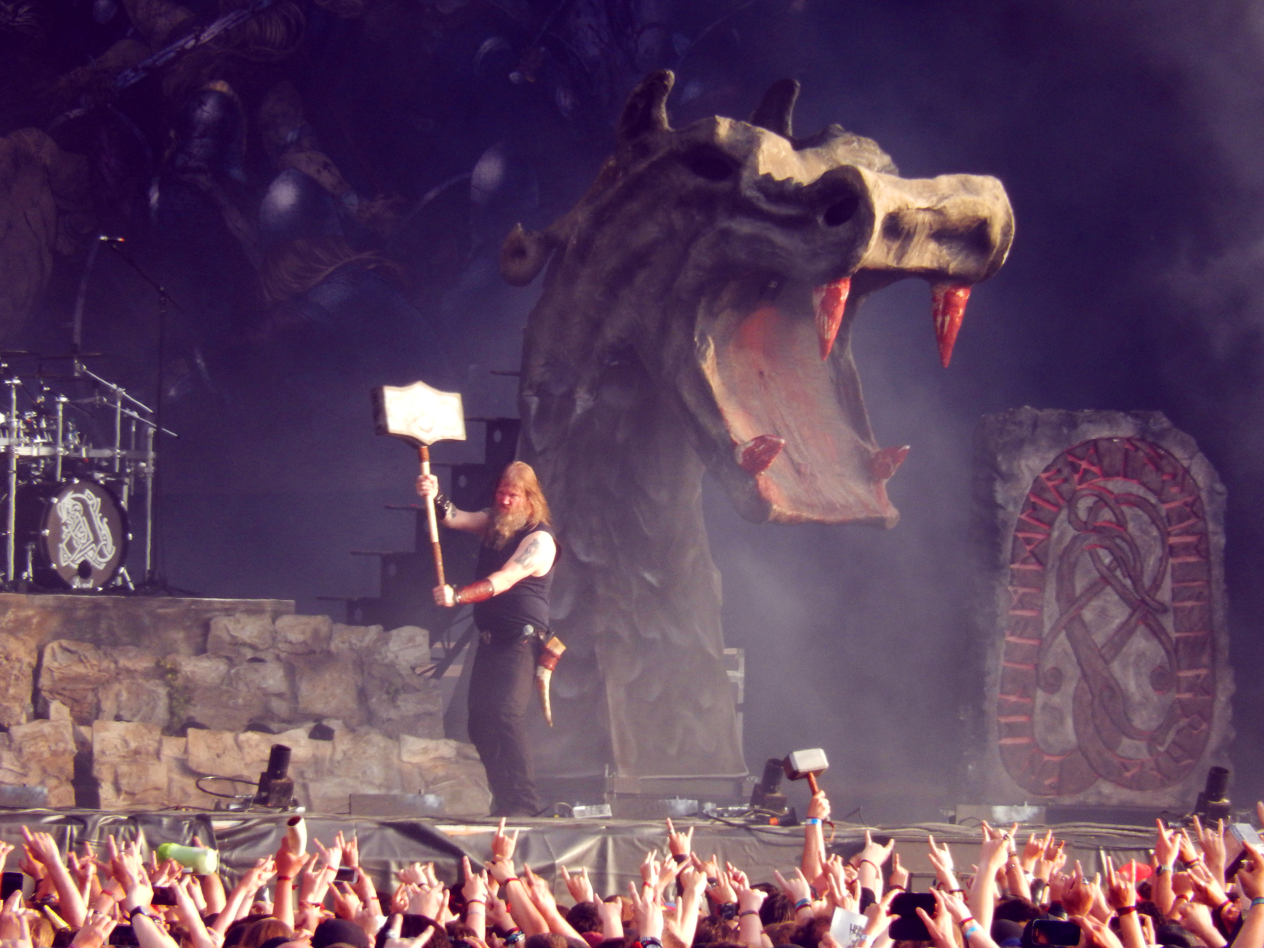 Johan Hegg au Hellfest 2016